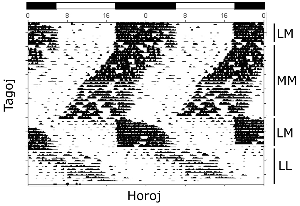 Rul-kurada aktigramo de muso. Montras cirkadian periodon de aktiveco en lumo-mallumo ciklo, senĉesa mallumo, kaj senĉesa lumo. Ĉiu vico montras 48 horoj.